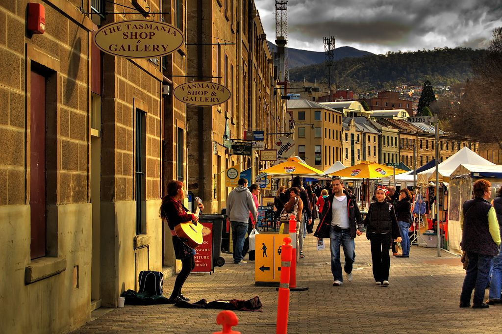 Salamanca Market at Salamanca Place, Hobart, Tasmania